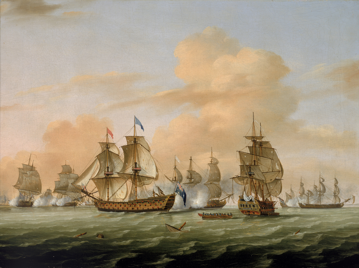 Vue générale de la première partie de la bataille de Lagos, le 18 août 1759 au large des côtes portugaises. Guerre de Sept Ans.